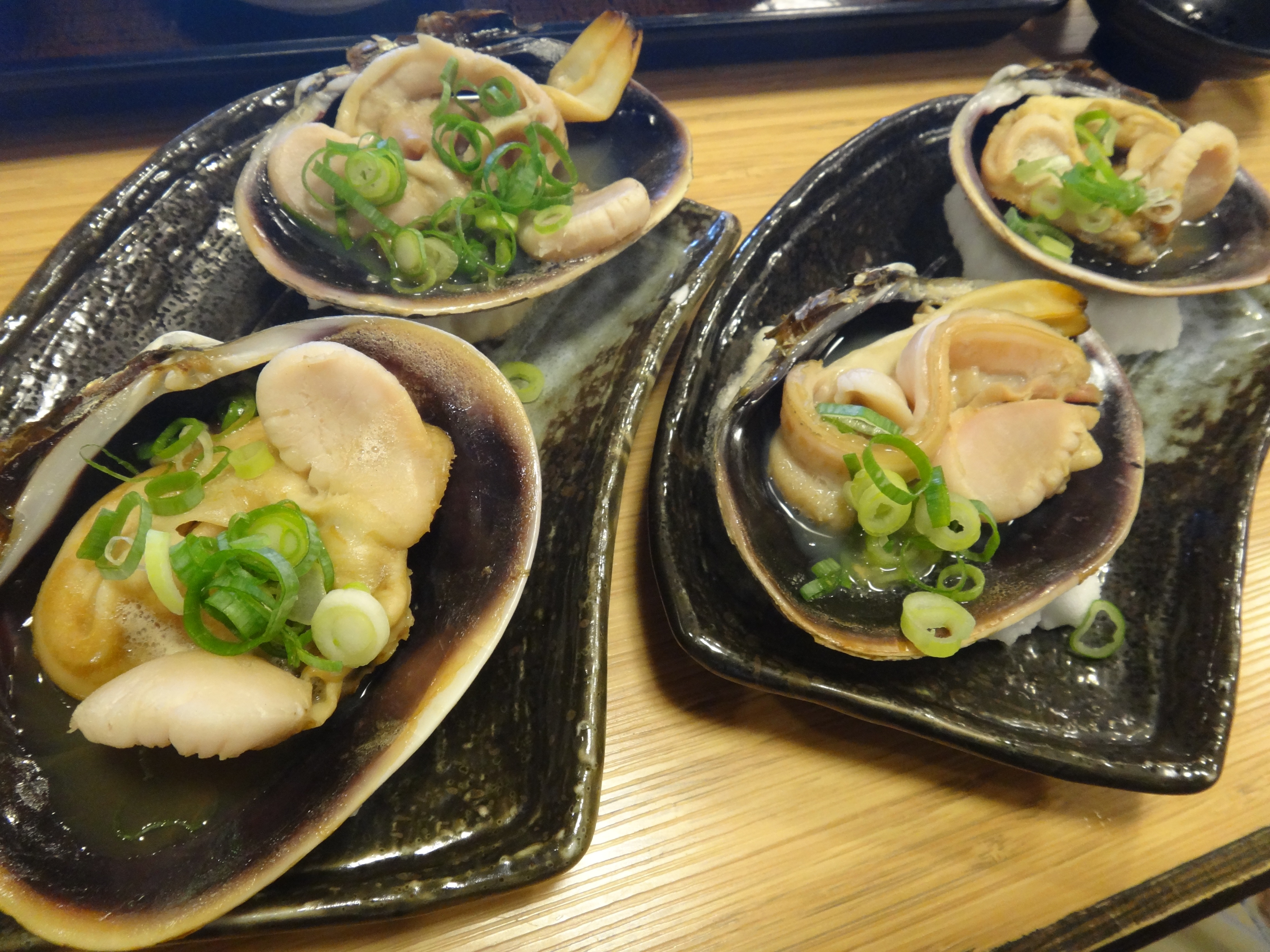 魚太郎 大あさり焼き